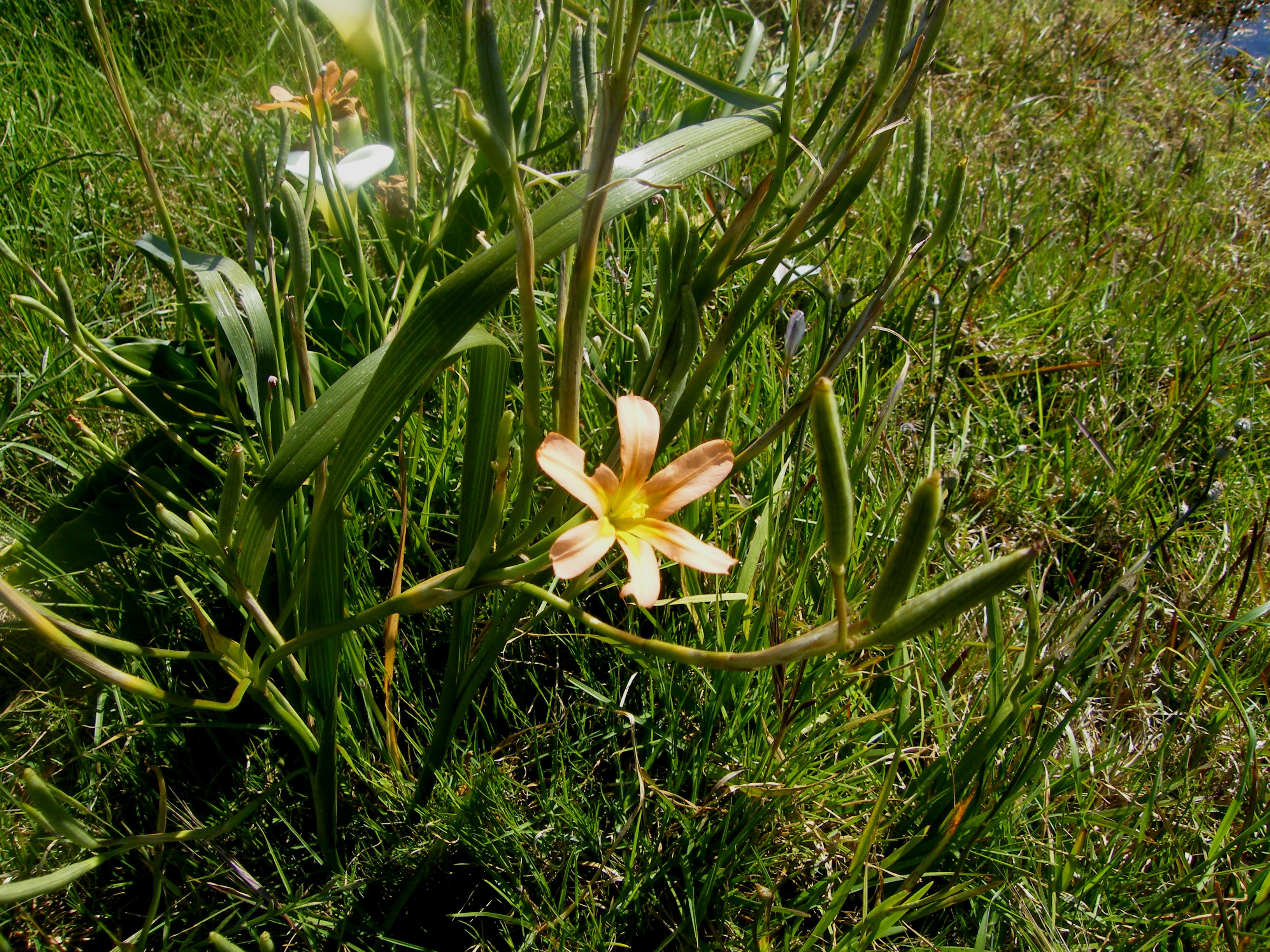 Groottulp